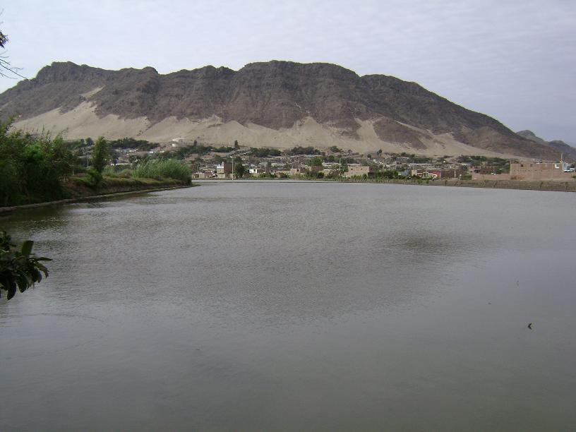 Cero Chepén